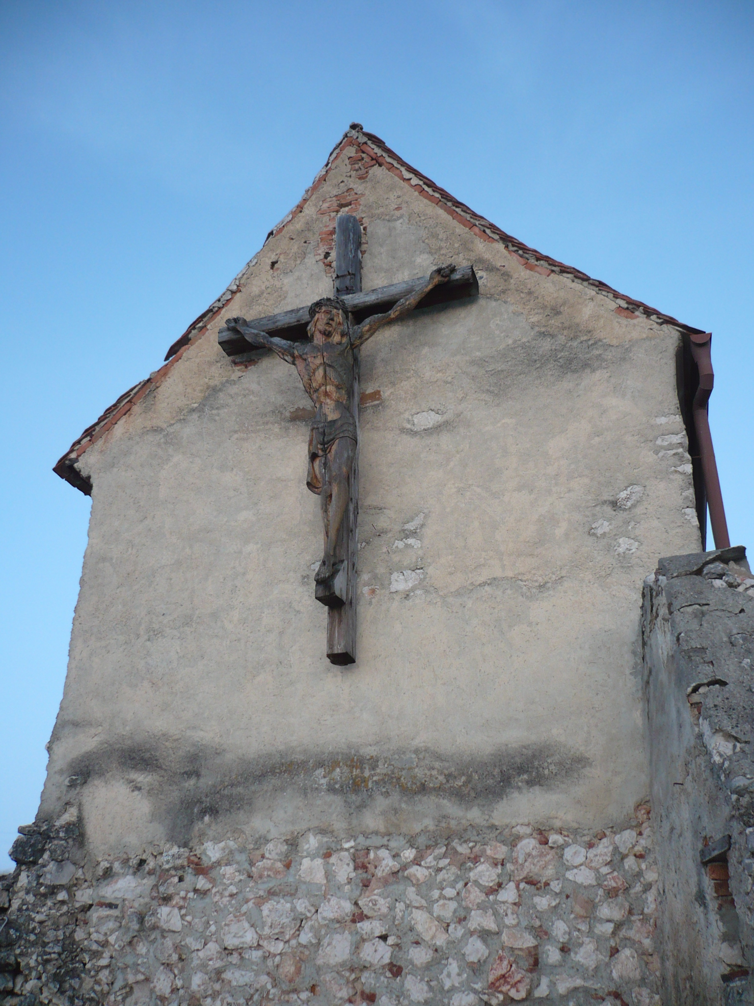 capela